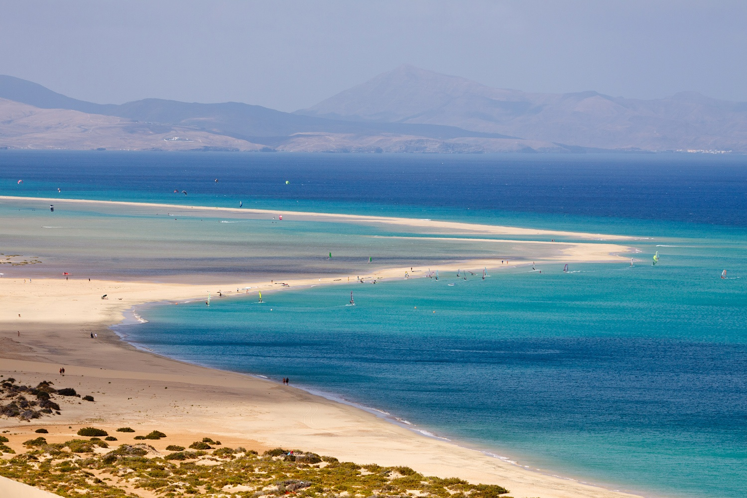 Fuerteventura, Kanarische Inseln, Spanien, Datum/Uhrzeit: 05.06.2011 17:38:34